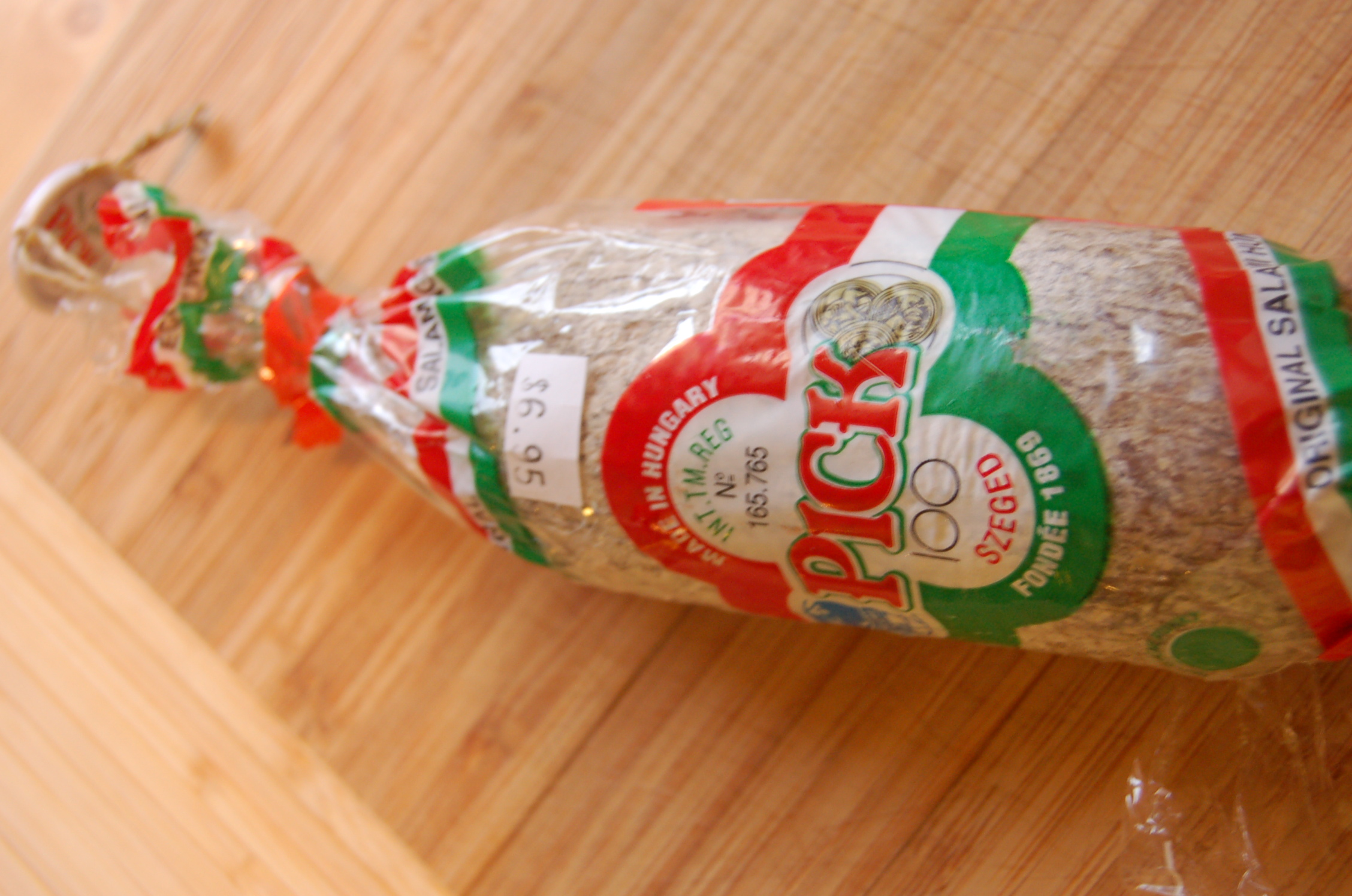 Csomagolt Pick téliszalámi rúd